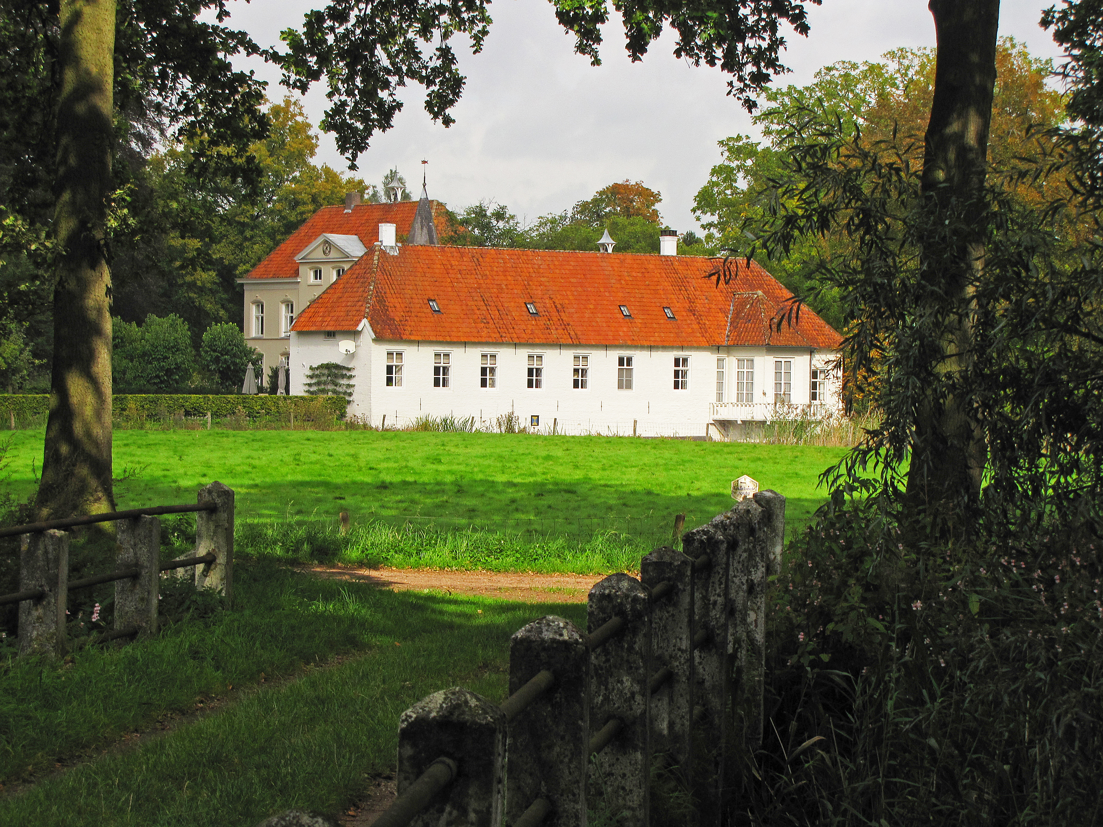 Kasteel Eyckenlust gezien vanaf de Kasteelsingel.